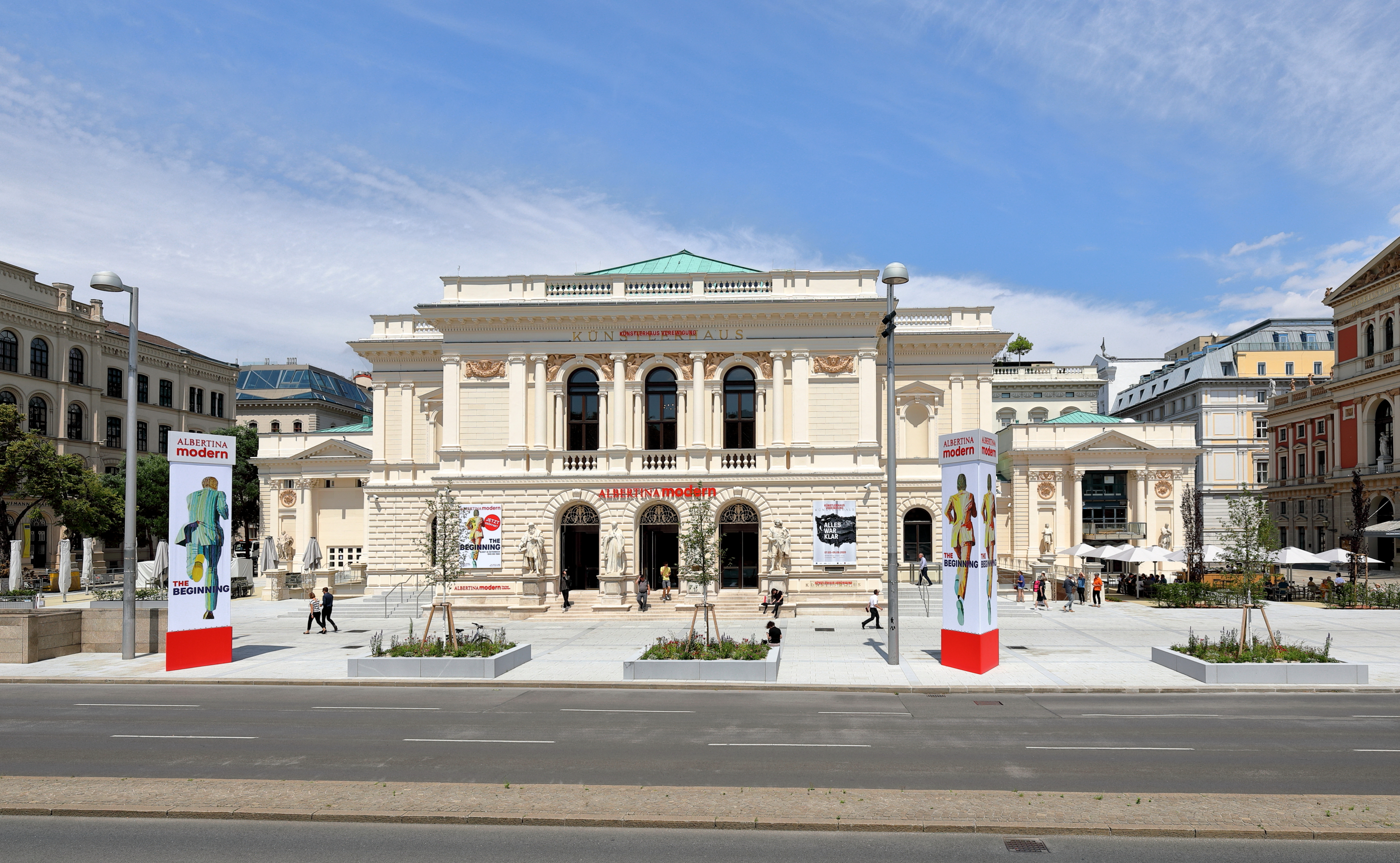 Das Museum „Albertina modern“, als zweiter Standort der Albertina, an der Adresse Karlsplatz Nr. 5 im 1. Wiener Gemeindebezirk Innere Stadt.Beheimatet ist die „Albertina modern“ im Künstlerhaus, einem nach Plänen von August Weber ab 1865 im Stil der italienischen Renaissance errichtetes Ausstellungshaus (Eröffnung am 1. September 1868). Ab 2017 wurde es renoviert und nach den Bedürfnissen eines modernen Museumsgebäude umgebaut. Auf rund 2.000 m2 Ausstellungsfläche werden Werke bedeutender, zeitgenössischer österreichischer und internationaler Künstler gezeigt. Am 27. Mai 2020 fand die Eröffnung statt, nachdem wegen der Corona-Pandemie die geplante am 13. März 2020 abgesagt werden musste. Die erste Ausstellung „The Beginning. Kunst in Österreich 1945 bis 1980“ bot mit 400 Kunstwerken erstmals einen umfassenden Überblick über die Kunst Österreichs in den ersten Jahrzehnten nach dem Zweiten Weltkrieg.